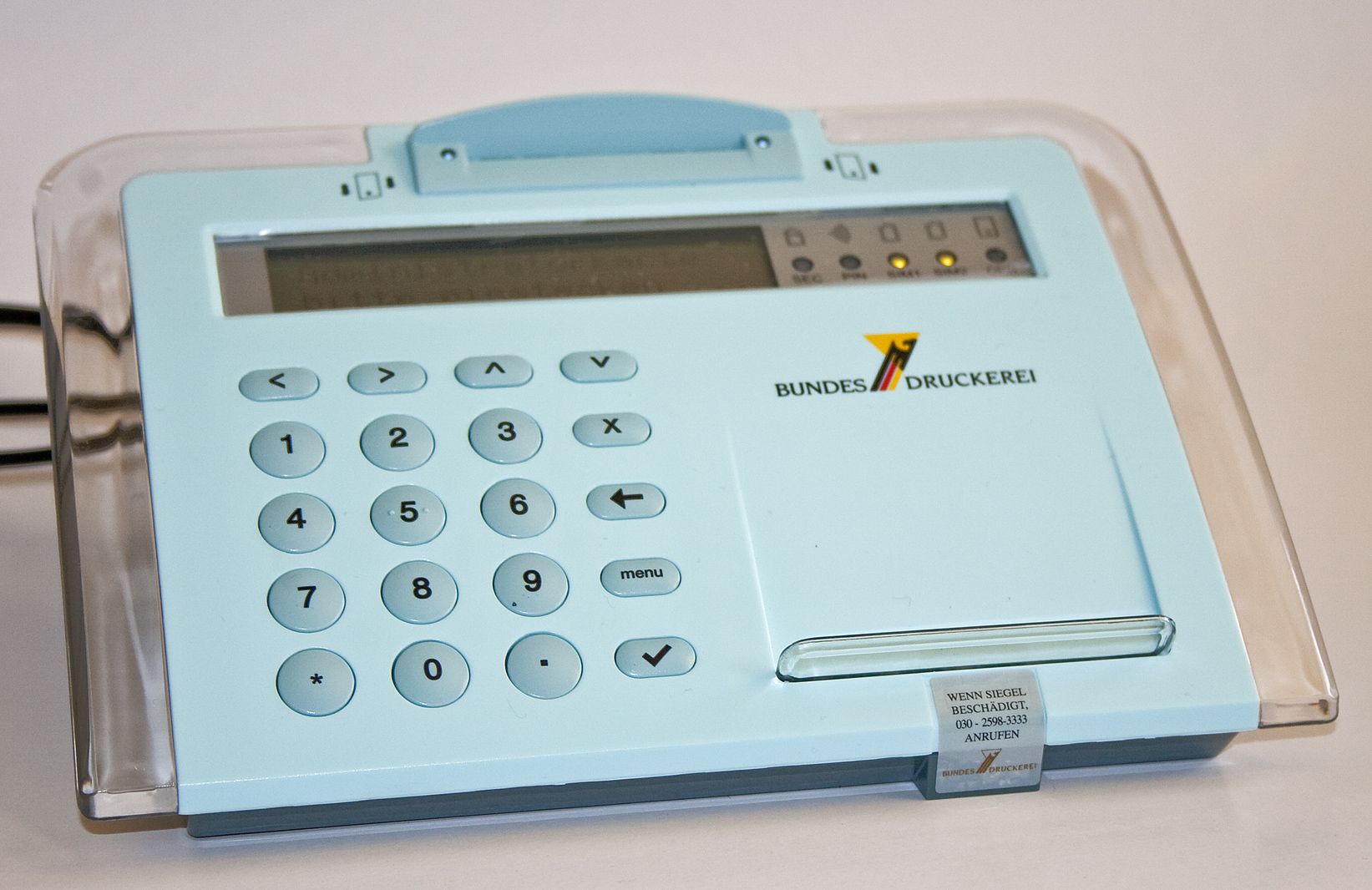 Änderungsterminal für die ab dem 1. November 2010 in Deutschland eingeführten neuen Personalausweise.